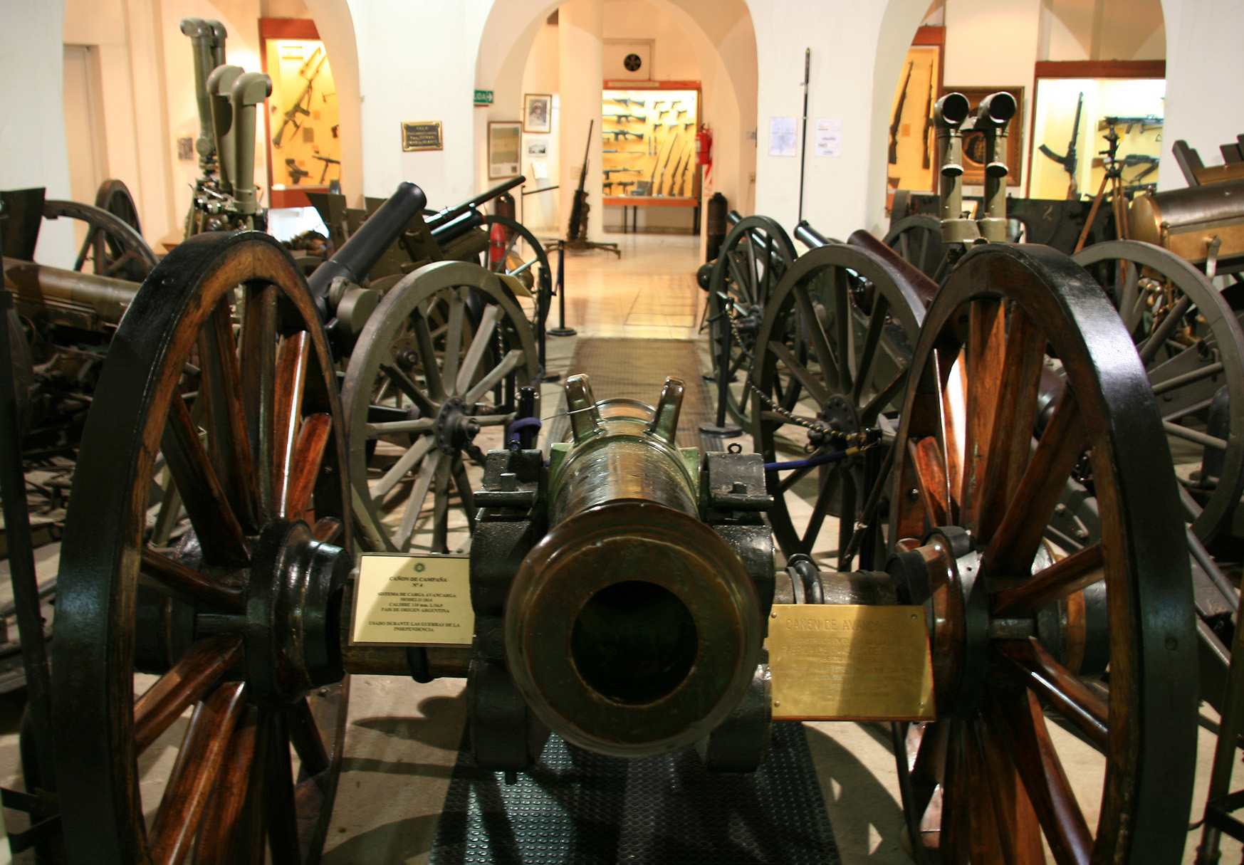 Artillery exhibition hall, Museo de Armas de la Nacion, Buenos Aires.